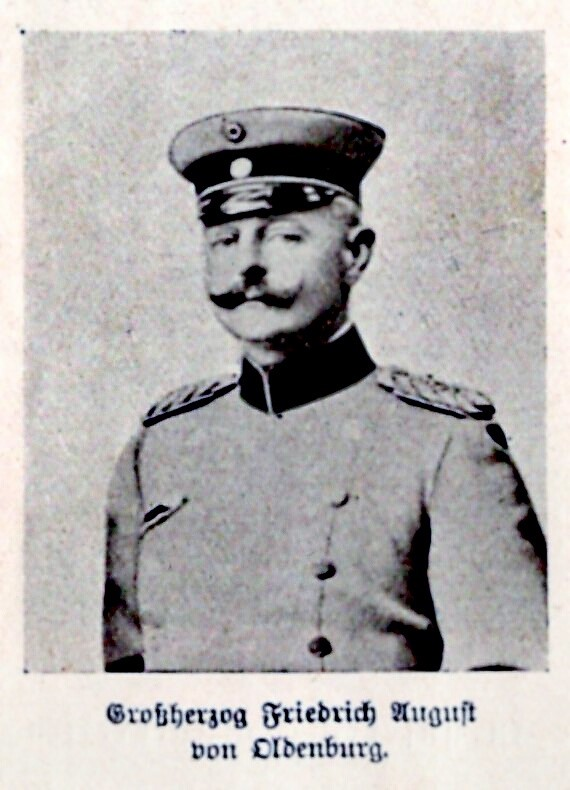 Porträt Friedrich August von Oldenburg